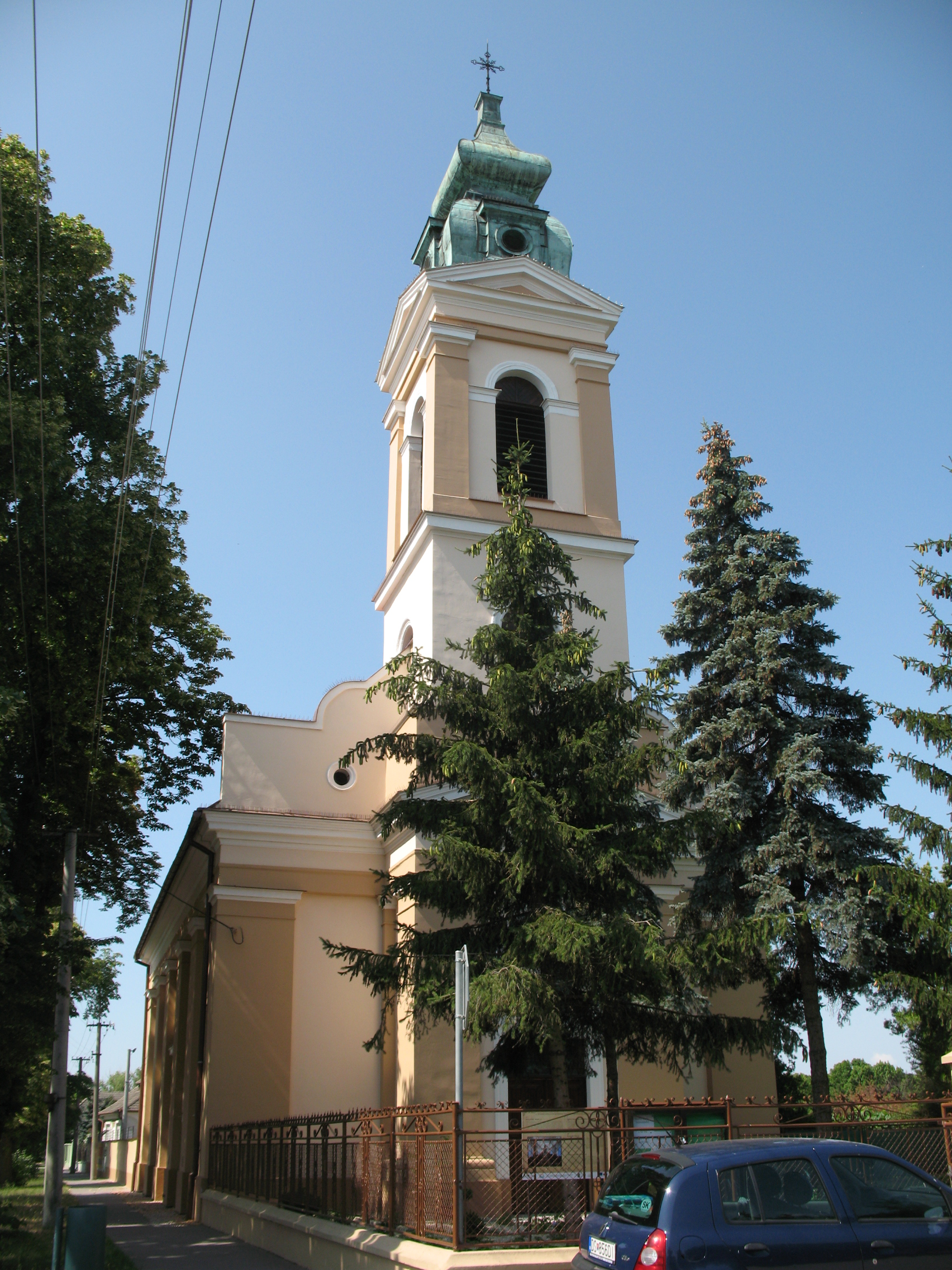 Horné Saliby - evanjelický kostol